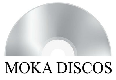 Logo tipo de Moka Discos